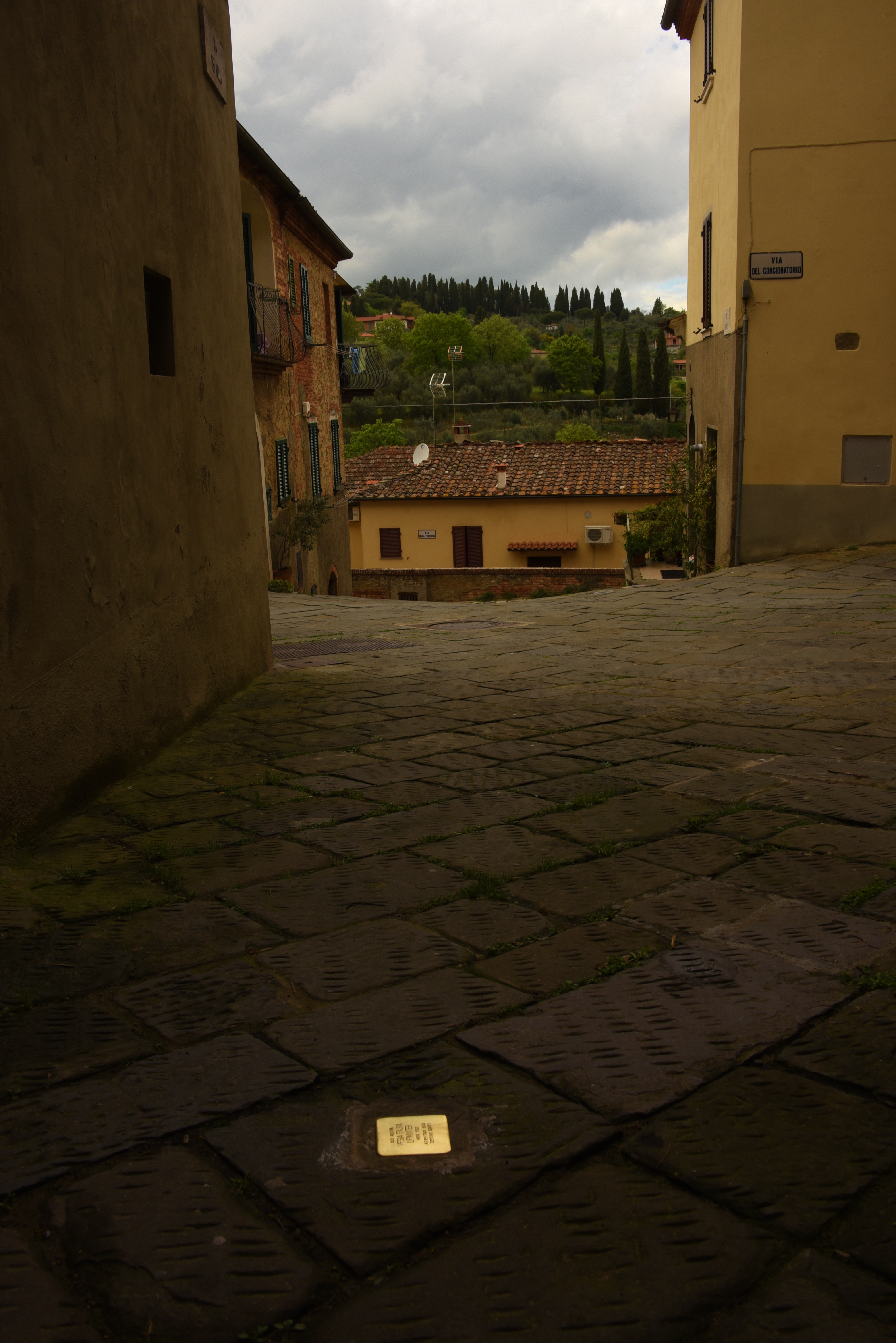 Stolperstein in Singalunga